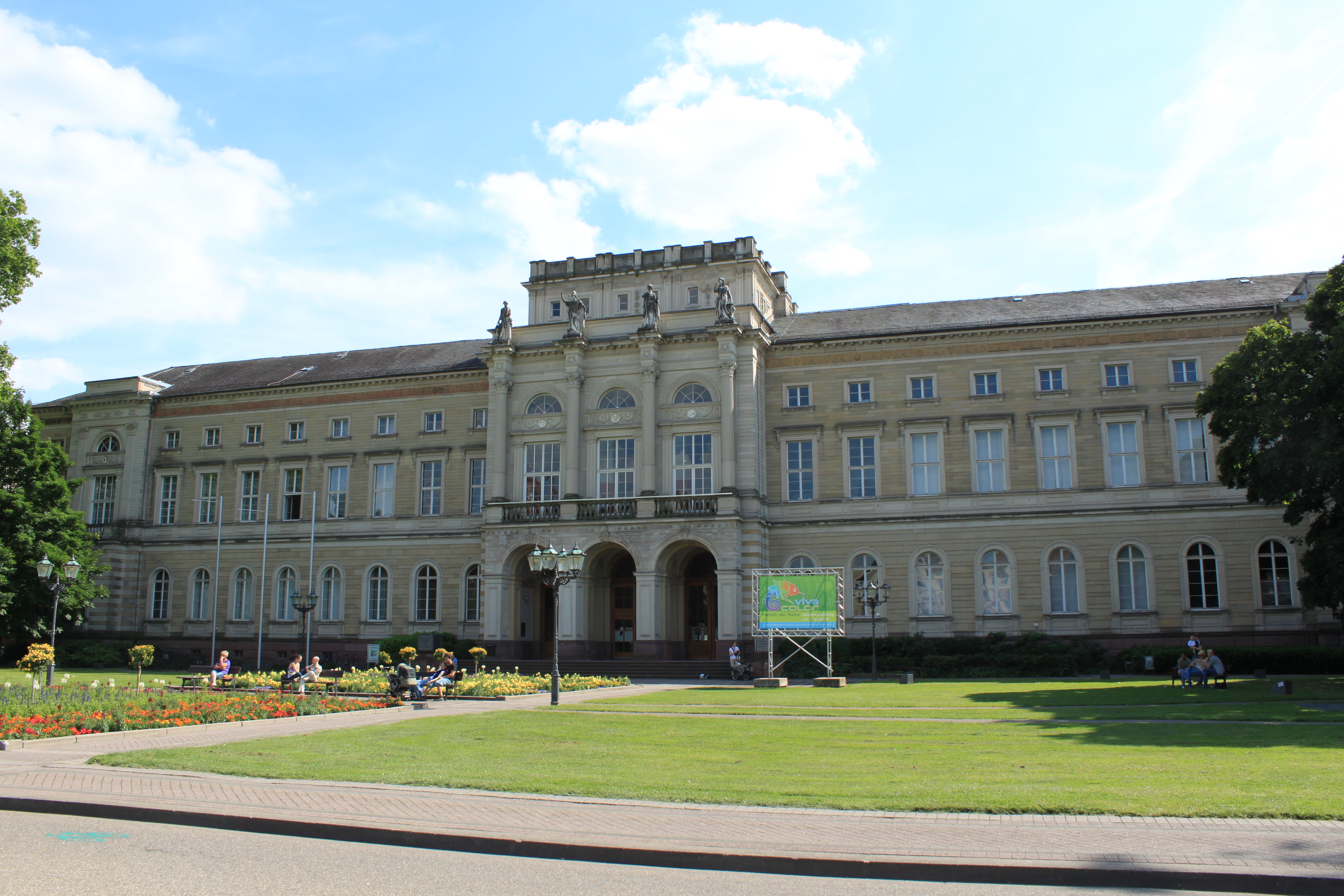 Karlsruhe, Allemagne